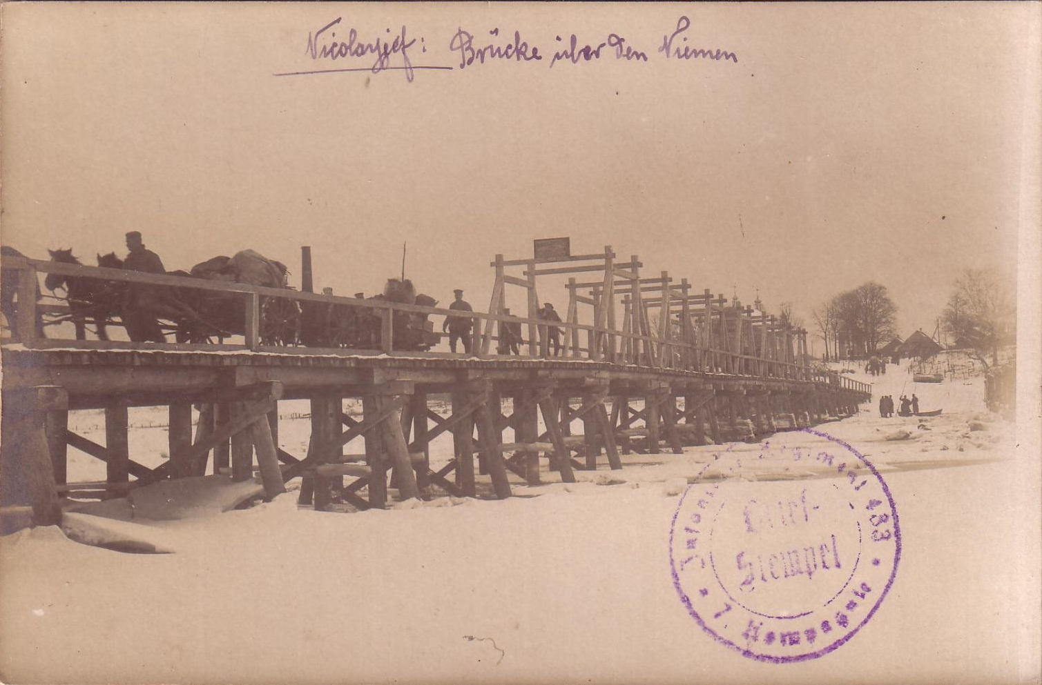 Беларуская (тарашкевіца): Мікалаеў (Mikałajeŭ), рака Нёман (Nioman)